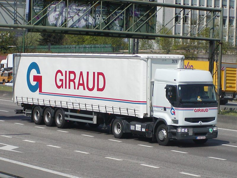 1996-2005 Renault Premium Route.